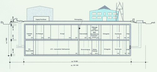 Die Grafik zeigt den Querschnitt des Nachrichtenbunkers in Strausberg